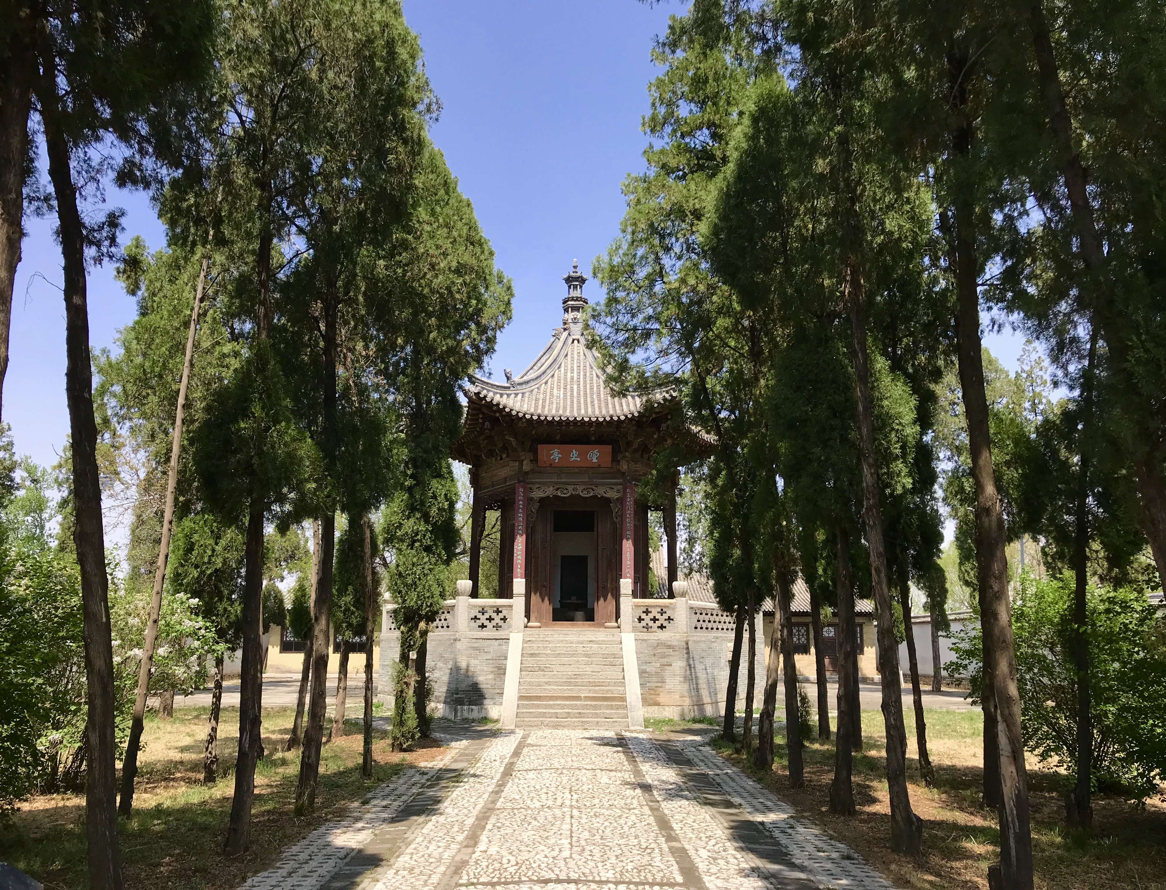 中文（台灣）: 山西省忻州市忻府區韓岩村元好問墓的野史亭